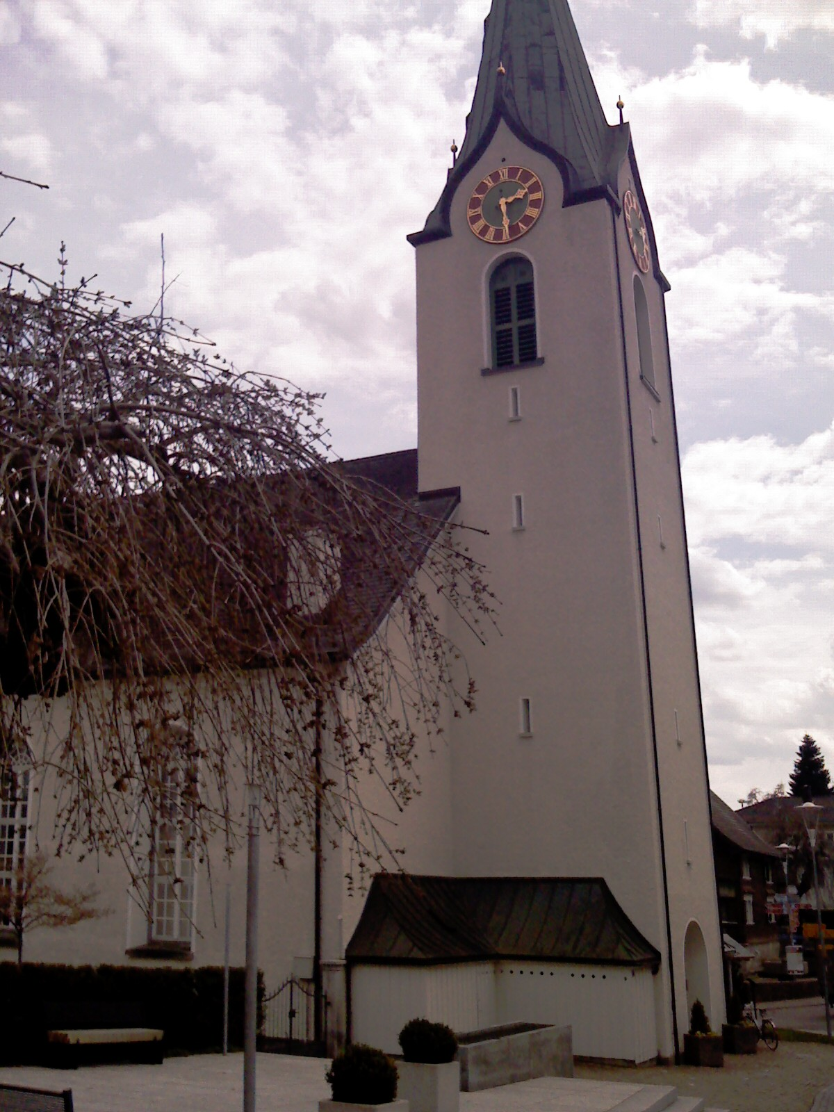 Hemberg, Protestant Church, Toggenburg, Switzerland - Hemberg en Togenburgo, protestanta preĝejo, Svislando